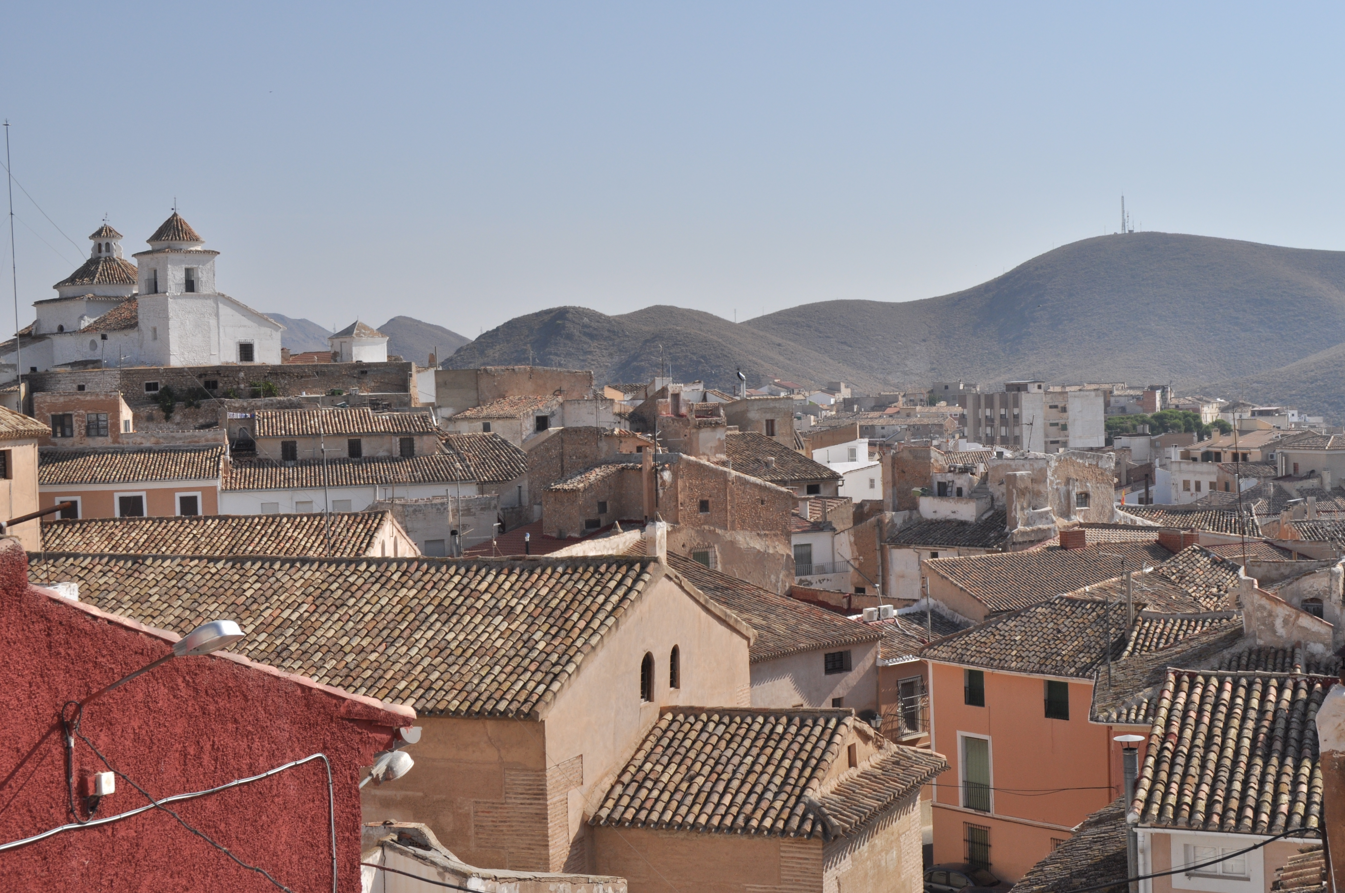 Hellin - 021